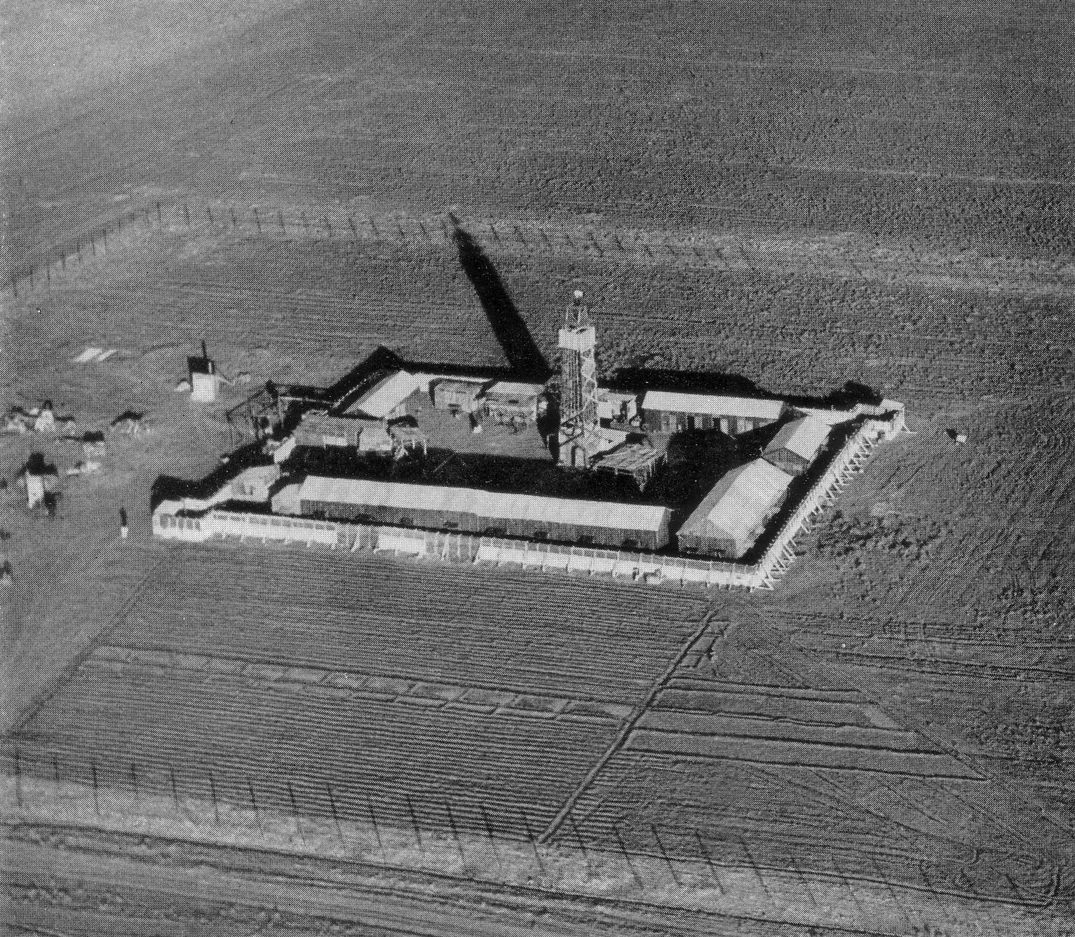 1938 יישוב חומה ומגדל בעמק יזרעאל, צילום אווירי